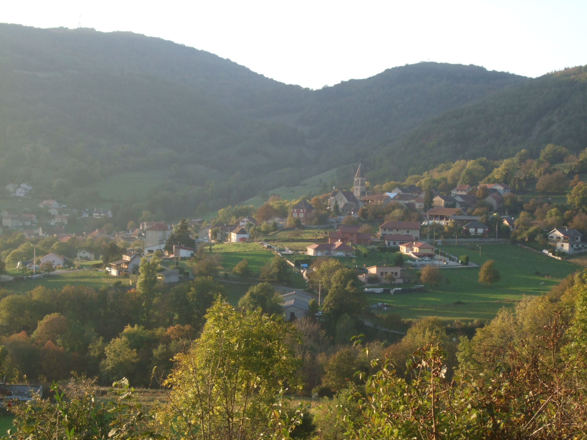 vue de la commune de Bénonces et de ses alentours